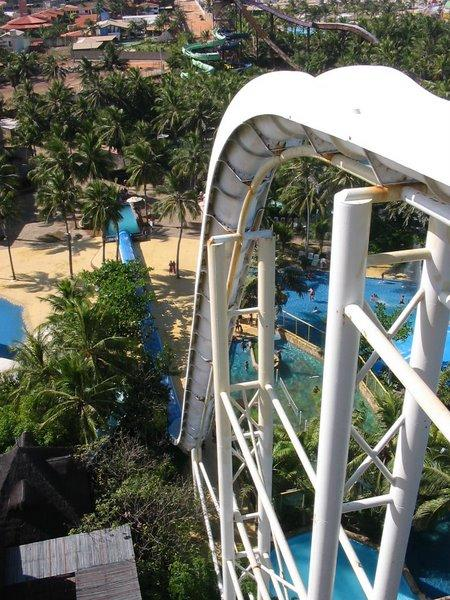 um dos maiores brinquedos do Beach Park com 41 metros de altura